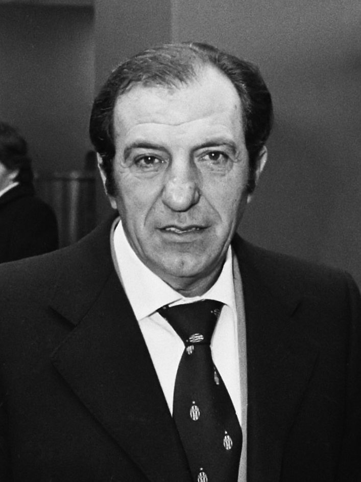 Elftal Juventus op Schiphol voor wedstrijd tegen Ajax (Europacup III ), trainer Parola (m) met doelman Zoff (l) en Altafini (r) 10 december 1974